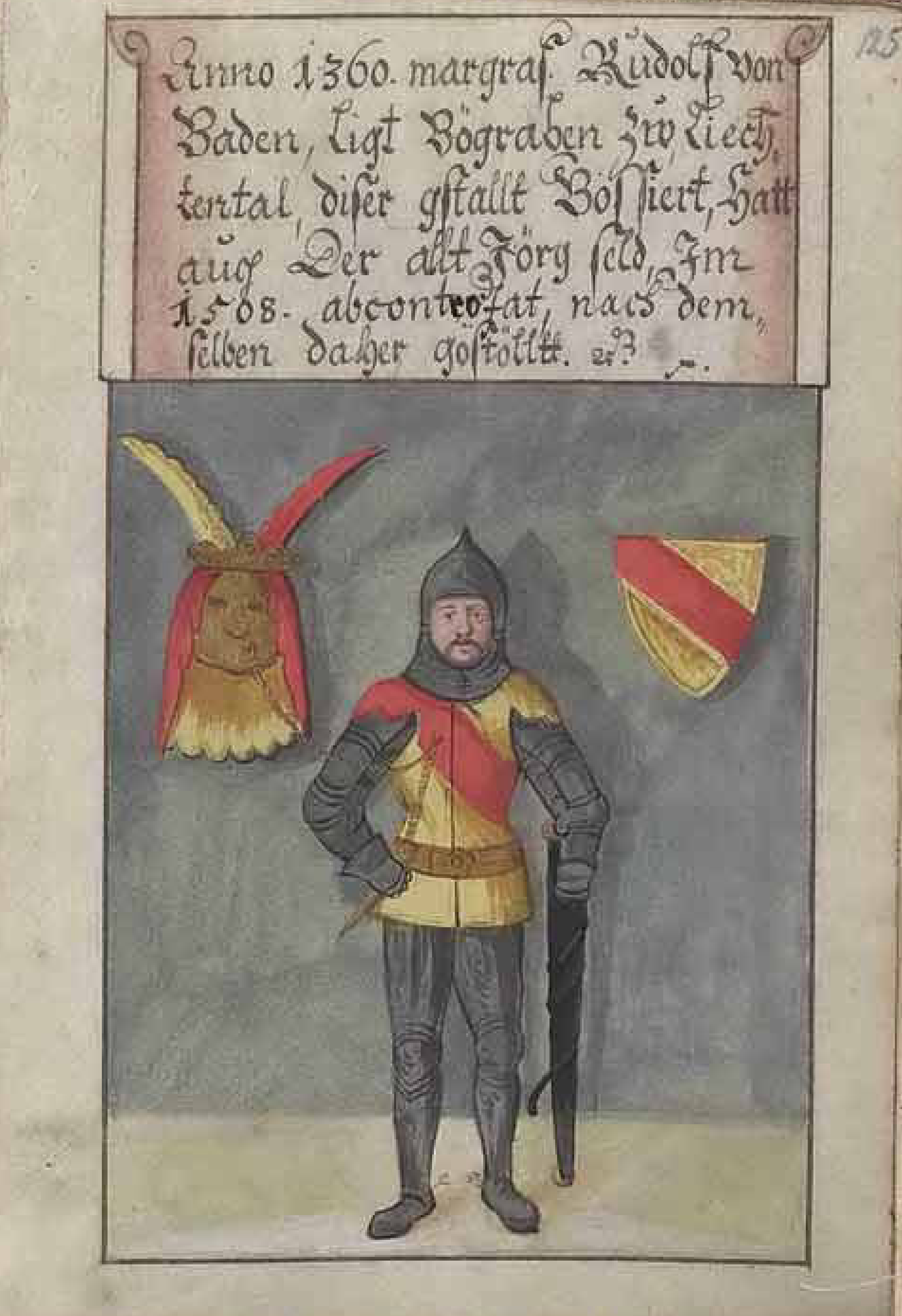 Trachtenbuch des Augsburgers Matthäus Schwarz (1497–1574)